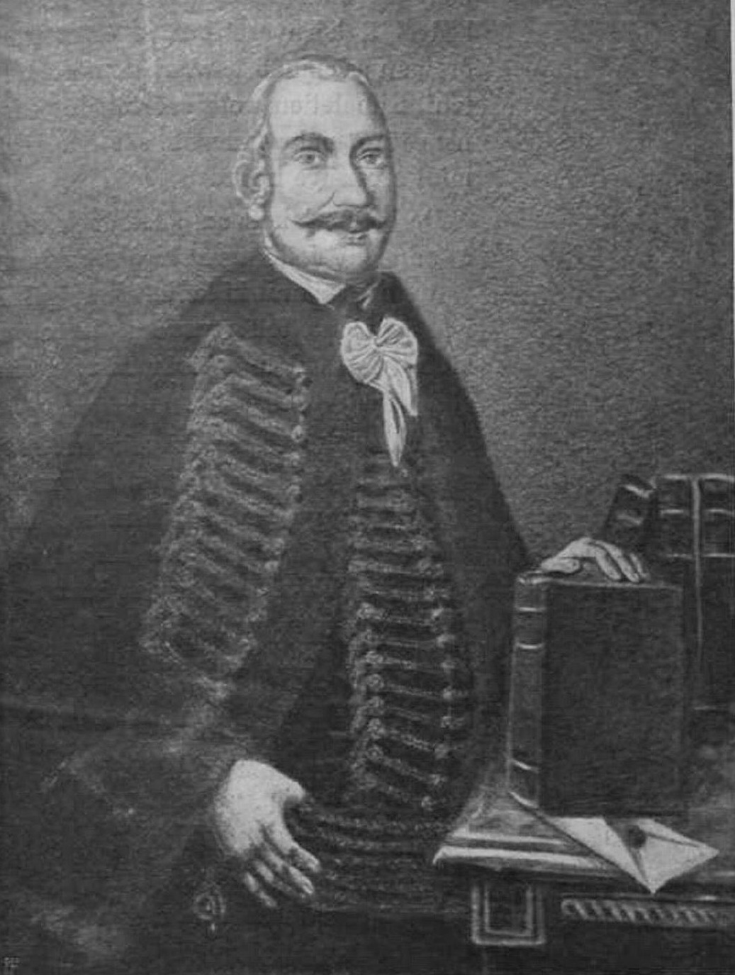 idősebb kehidai Deák Ferenc, a haza bölcse édesapja